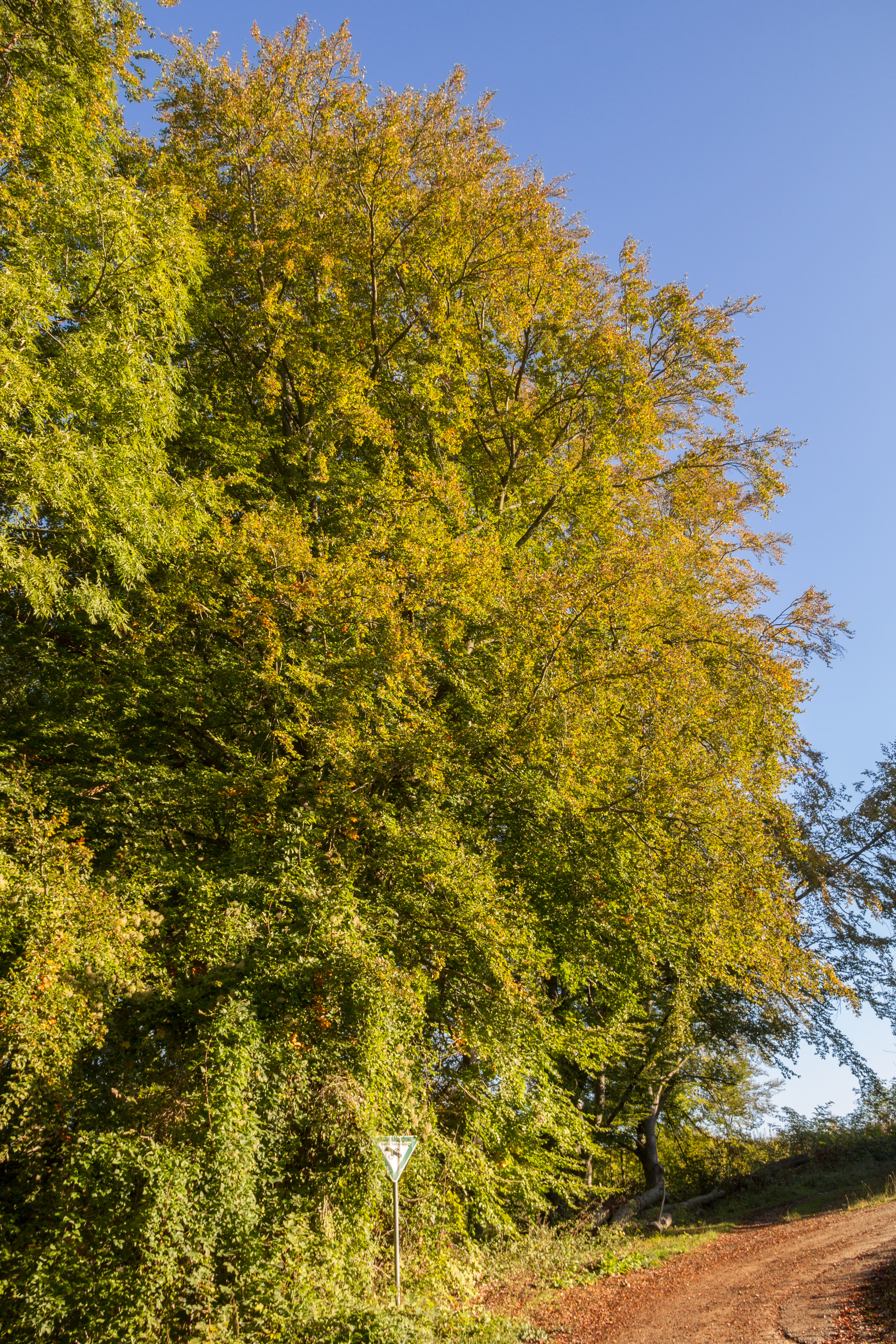 Breitenbrunner Buche, Naturdenkmal